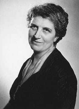 Politica italiana